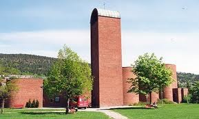 Det månedlige medlemsmøtet holdes i Åssiden kirke.